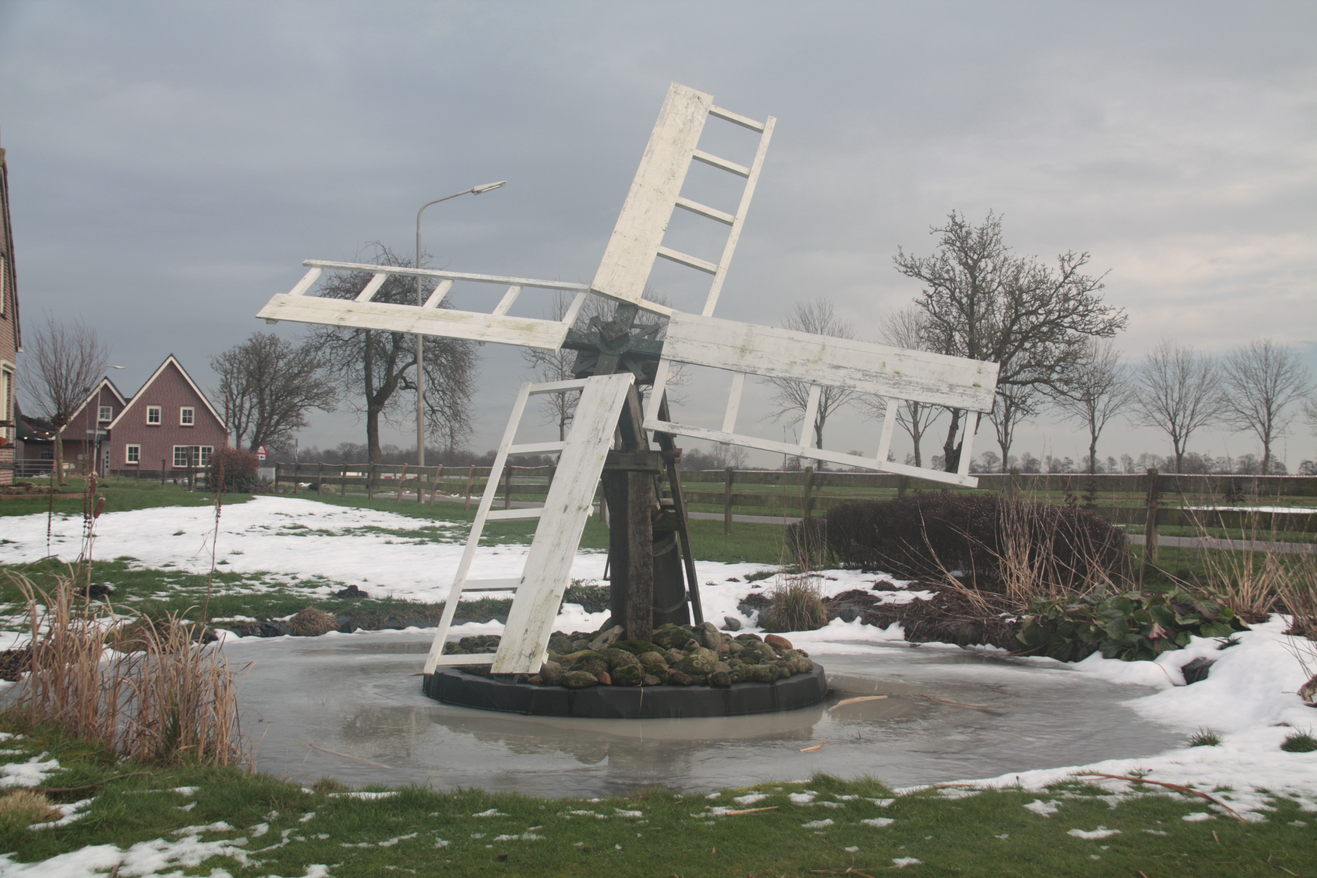 Tjasker Nijeveen